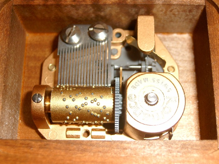 Innenleben einer Spieldose